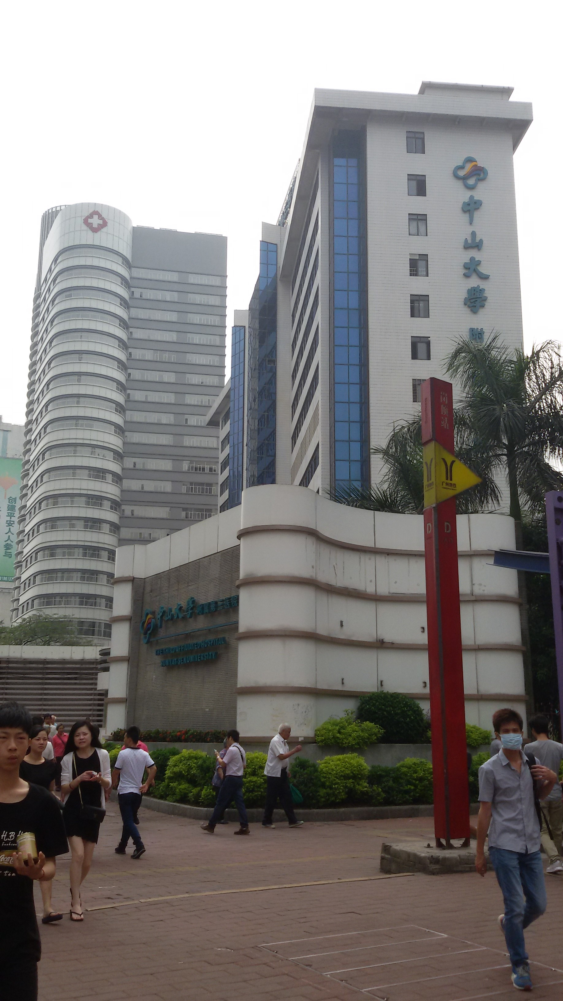 粵語: 中山大學附屬第三醫院（天河总院）